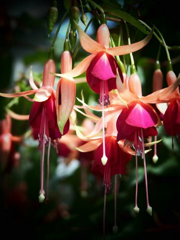 Fuchsienblüten (Fuchsia sp.)